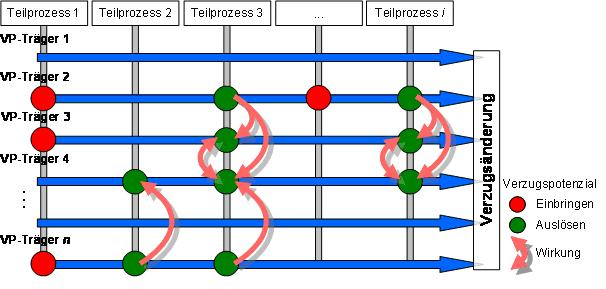 Wechselwirkungen zwischen Verzugspotentialträgern